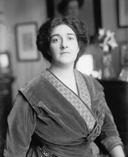 Berta Morena (Berta Meyer) (1878 - 1952), German soprano